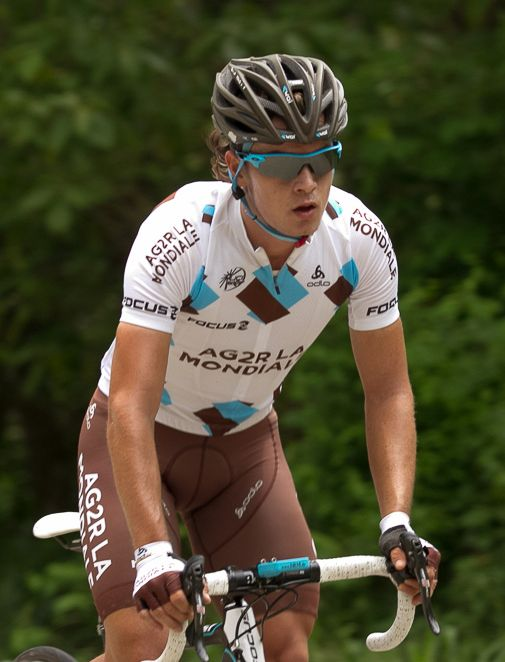 Ciclista colombiano Carlos Betancur, integrante del equipo francés AG2R